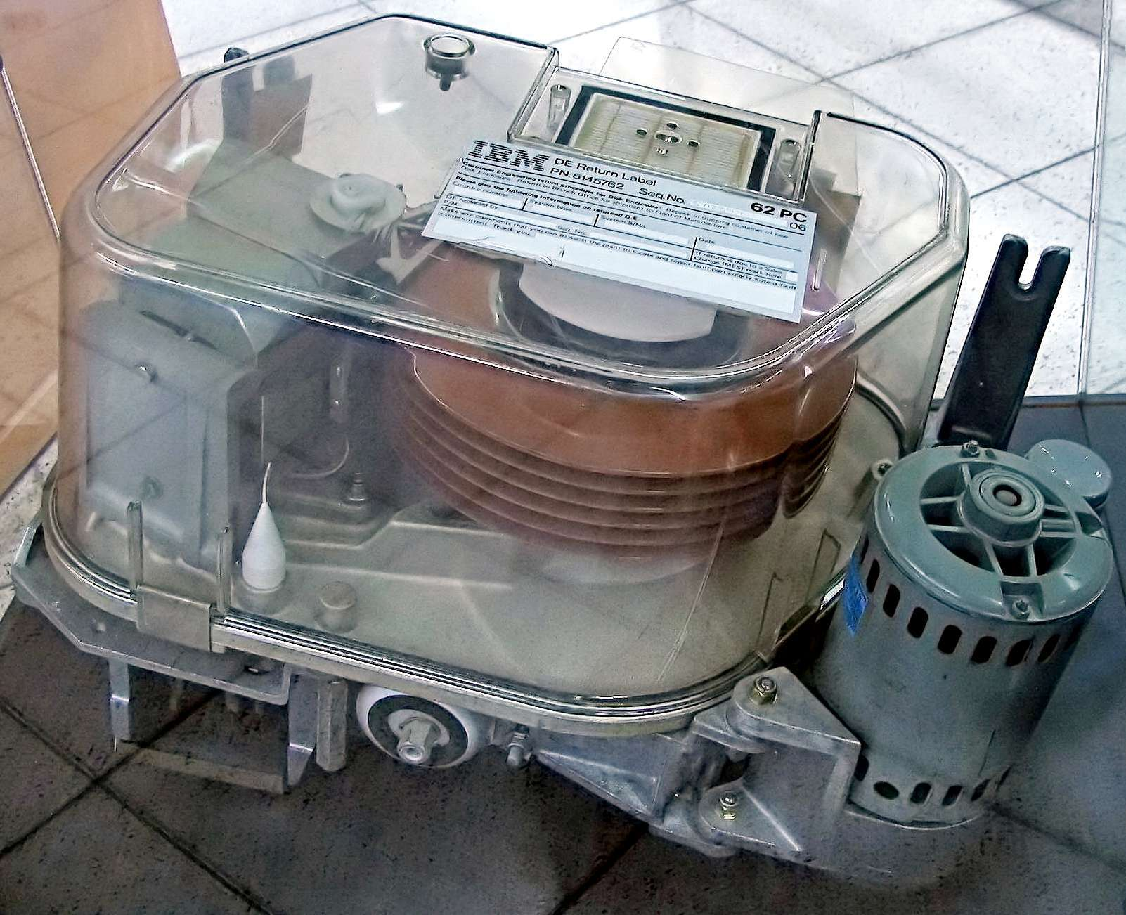 Old IBM Hard Disk Drive. Altes IBM Festplattenlaufwerk.